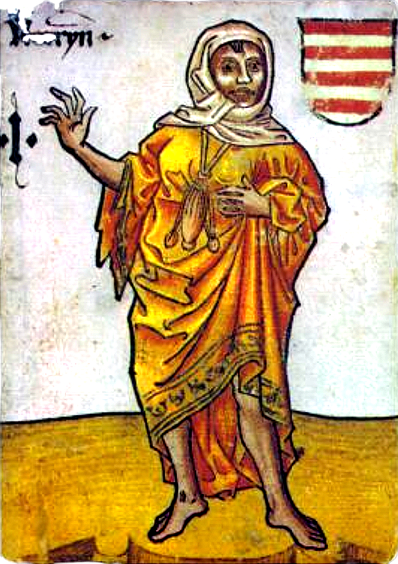 Nerryn - udvari bolond Hofämterspiel kártyajáték egy lapja.(Kunsthistorisches Museum, Bécs)